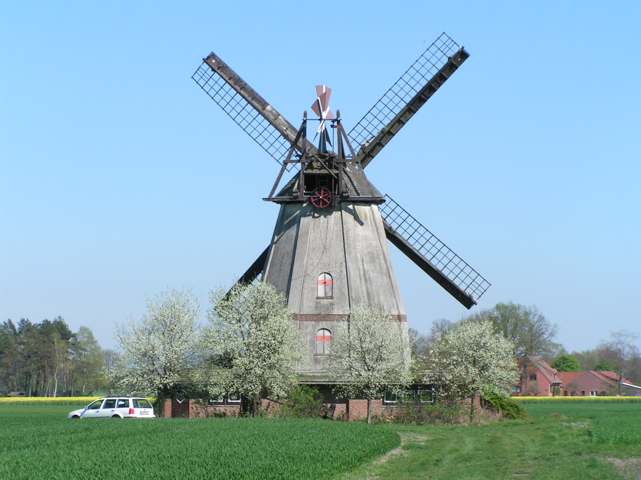 Windmühle Mösloh (Gemeinde Warmsen, Landkreis Nienburg/Weser, Niedersachsen)